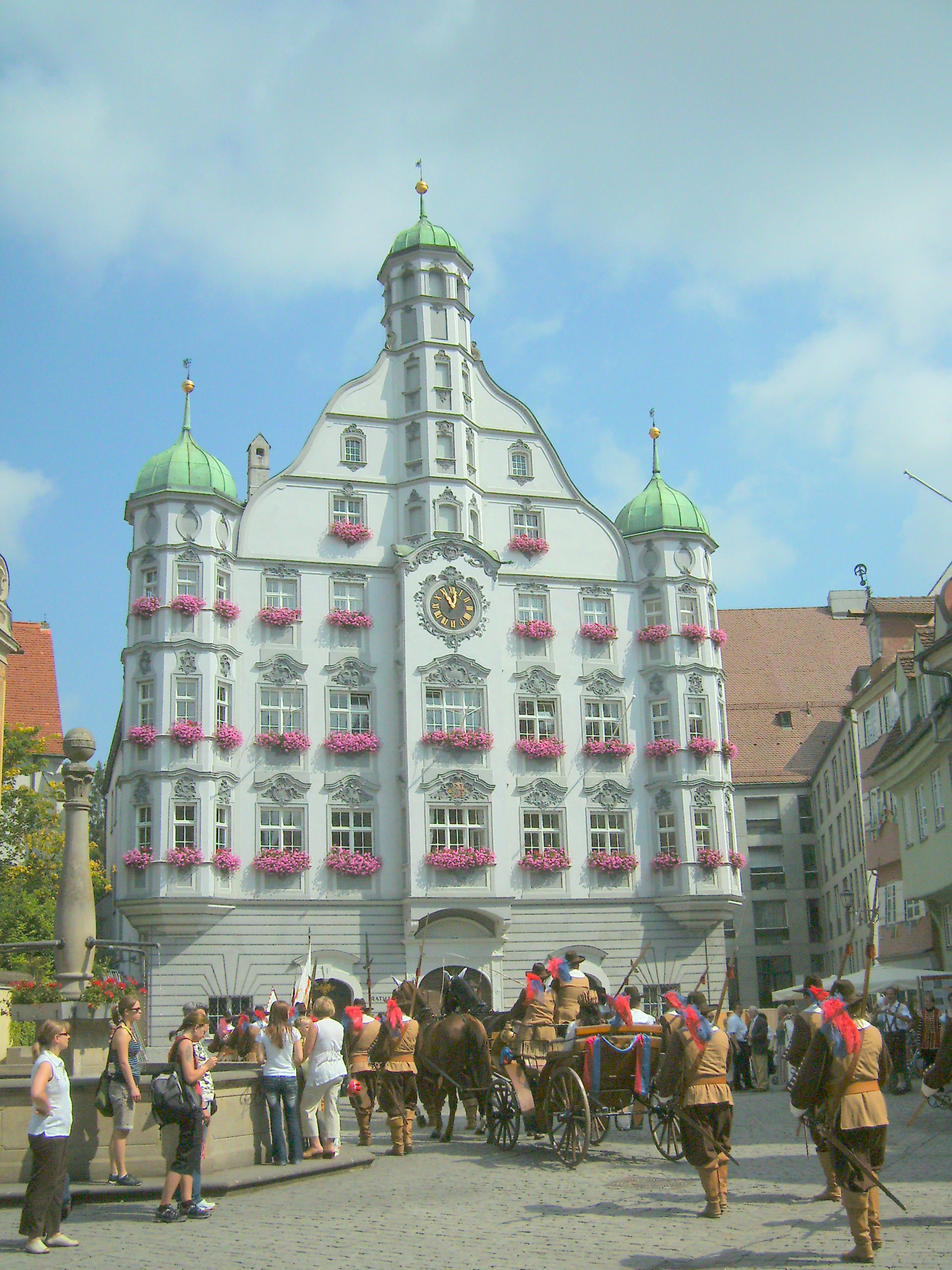 Wallensteinfestspiele - Leibwache Wallensteins vor dem Memminger Rathaus